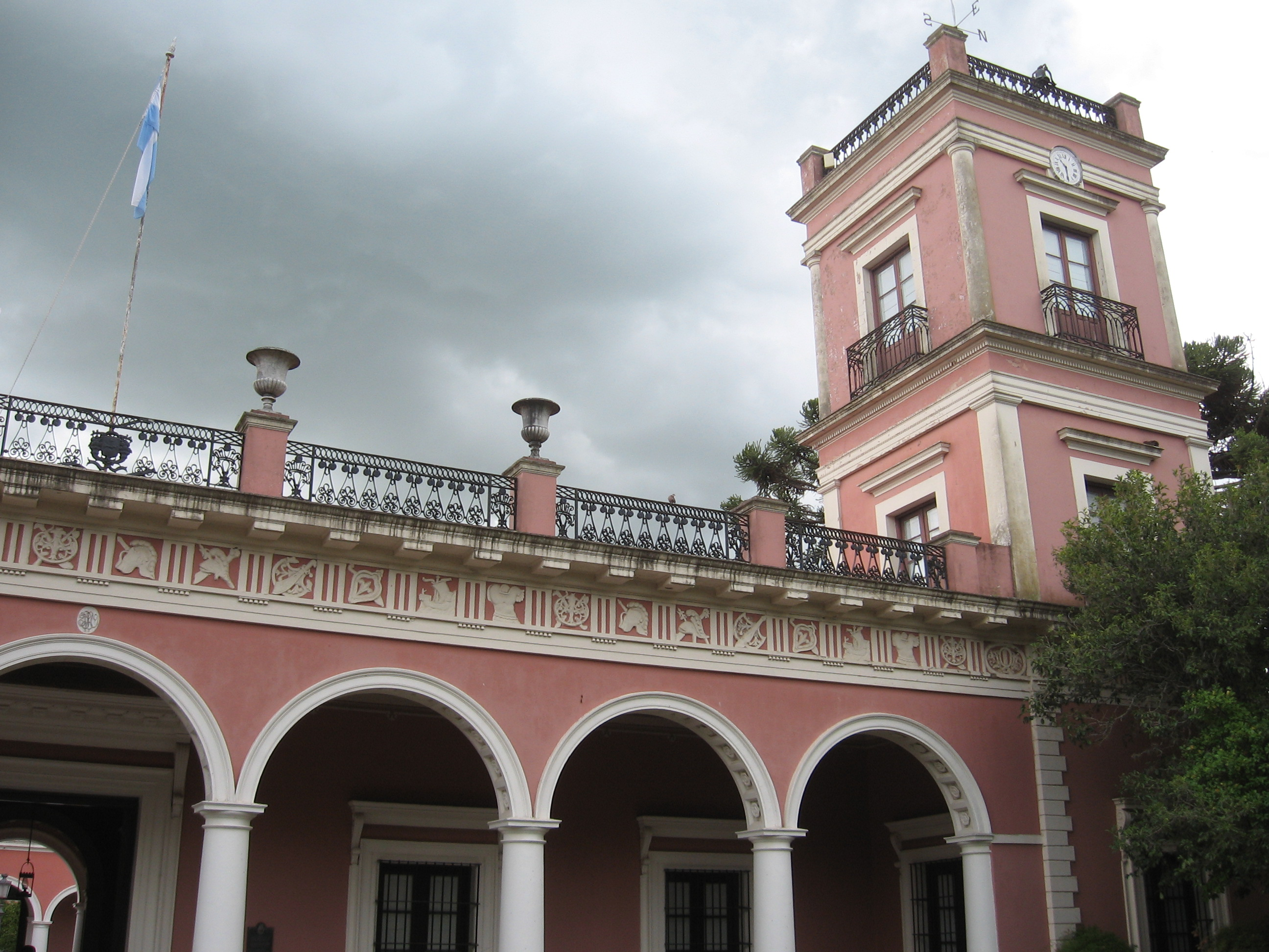 Fachada exterior del Palacio San José